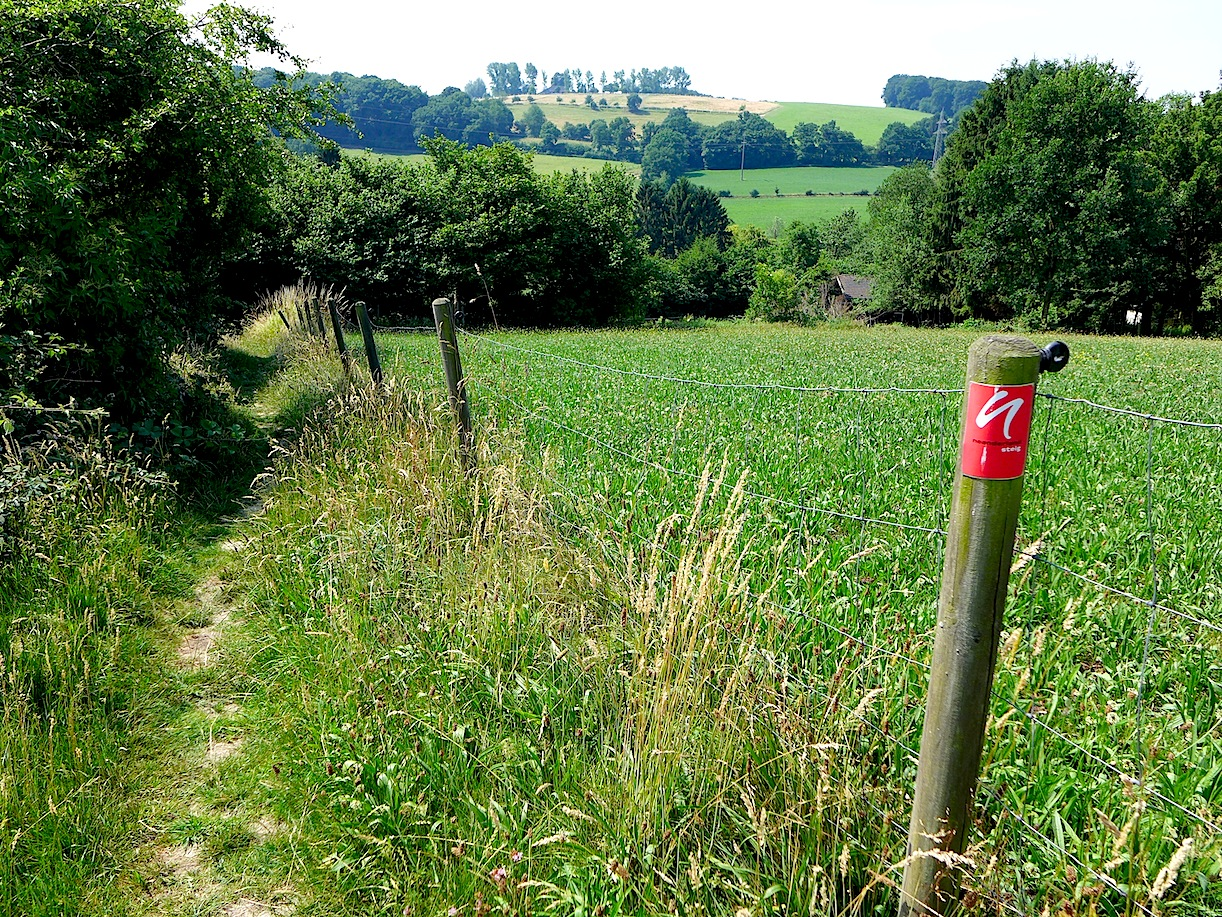 Этап "Невигес-Нордрат" маркированного турмаршрута "Тропа Неандерланд", Северный Рейн-Вестфалия, Германия.